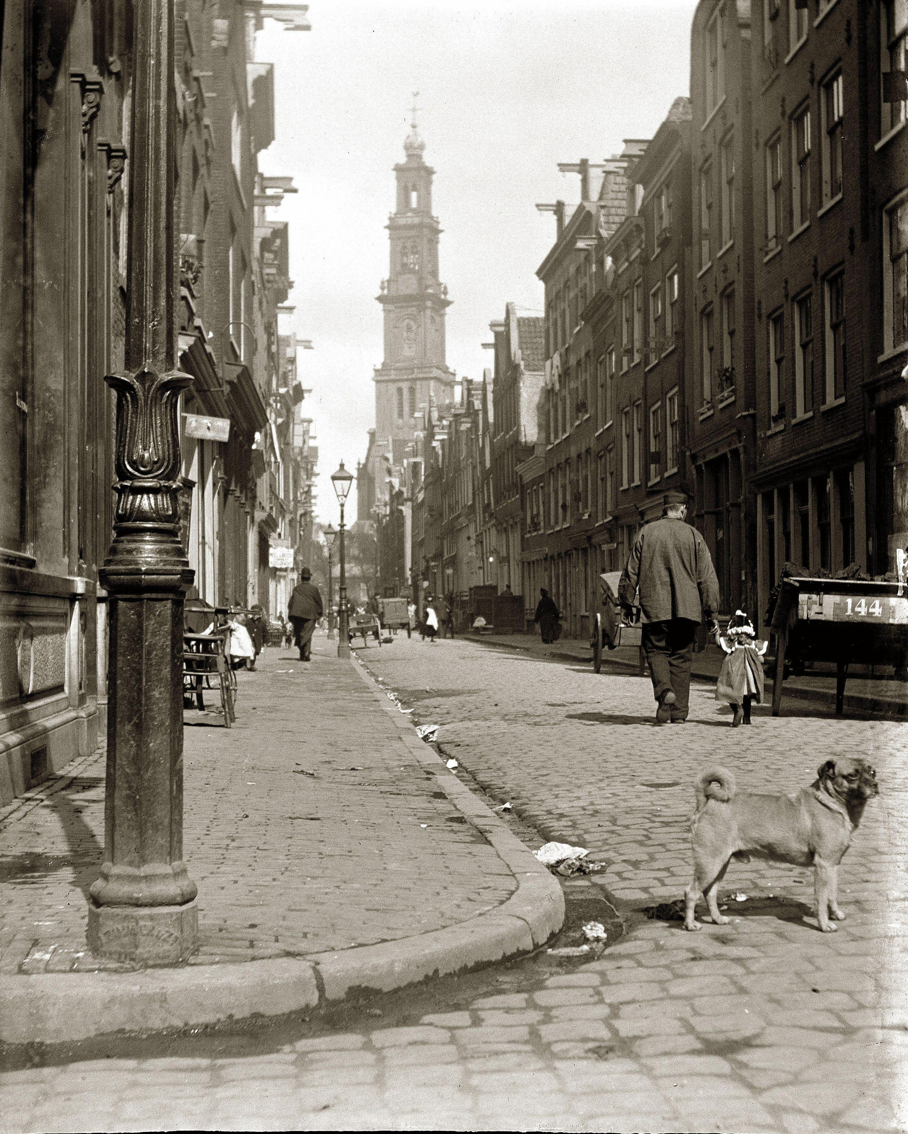 De Bloemstraat in de Jordaan in 1902. Foto: Jacob Olie. Het originele bestand staat hier en wordt hier gebruikt.